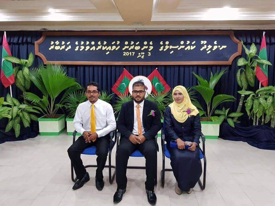 ދިވެހިބަސް: ވެލިދޫ ކައުންސިލް ގެ ތިންވަނަ ދައުރުގެ ހުވާކުރެއްވުމުގެ ރަސްމިއްޔާތުގެ ތެރެއިން ކައުންސިލް ރައީސްކަން ކުރައްވާފައިވާ ތިންބޭފުޅުން